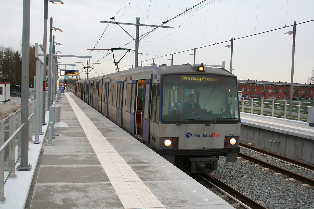 Dit voertuig raakte op 29 november 2007 ernstig beschadigd bij een ontsporing bij Forepark.